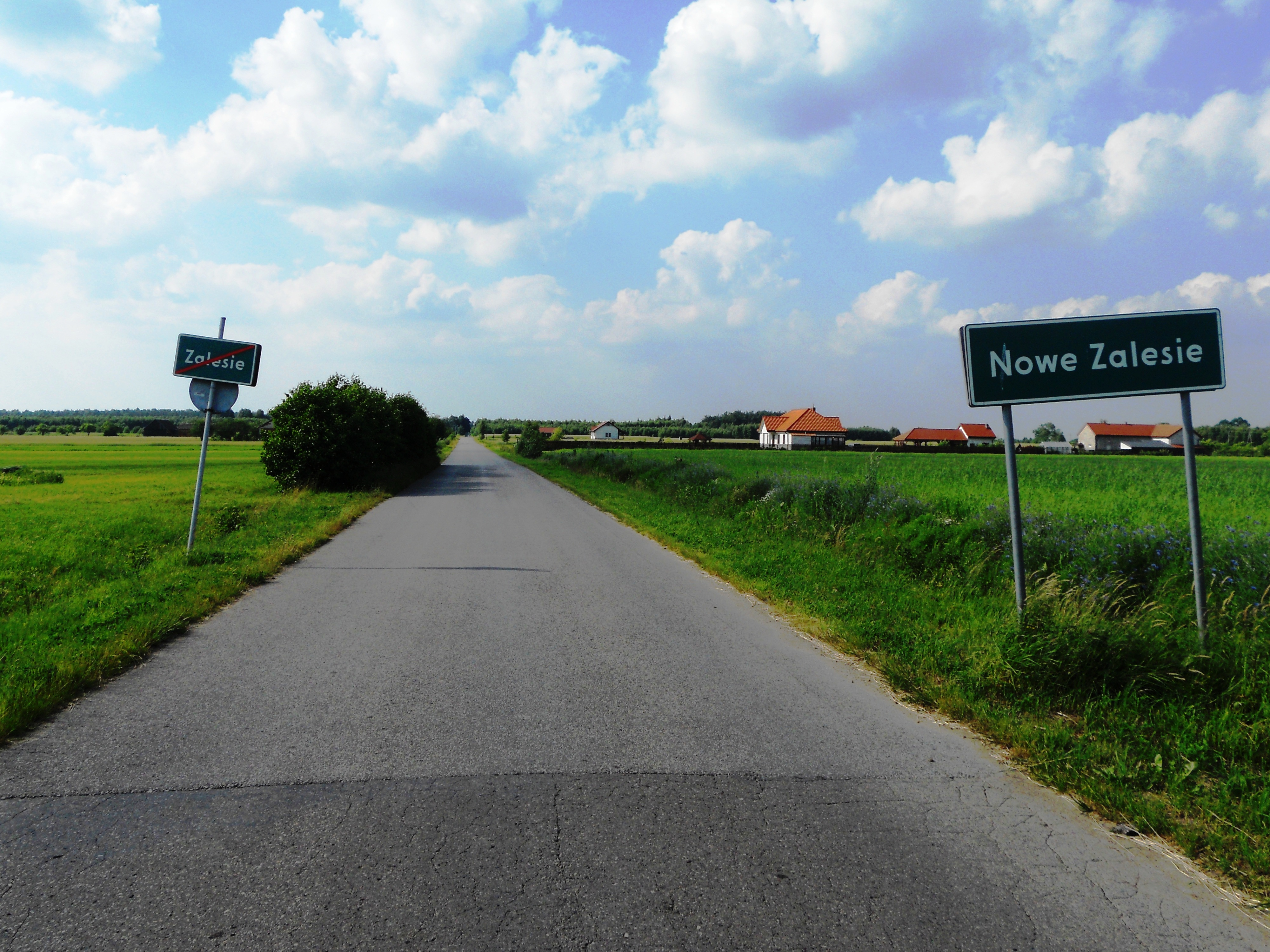 Wieś w gminie Siennica